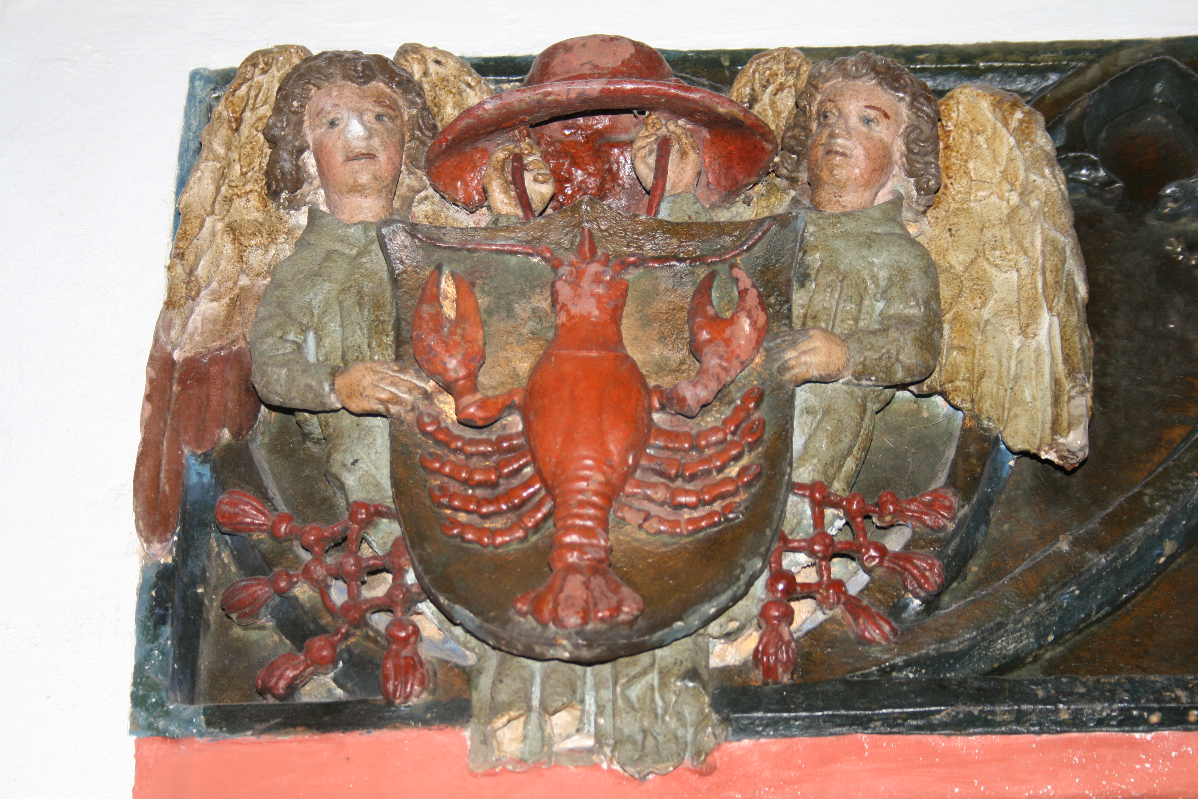 Wappen (Krebs) des Nikolaus Cusanus im Kreuzgang des Cusanus-Stifts in Bernkastel-Kues